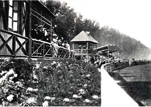 Vista lateral de la parte principal de la arena del Real Hipódromo de Legamarejo